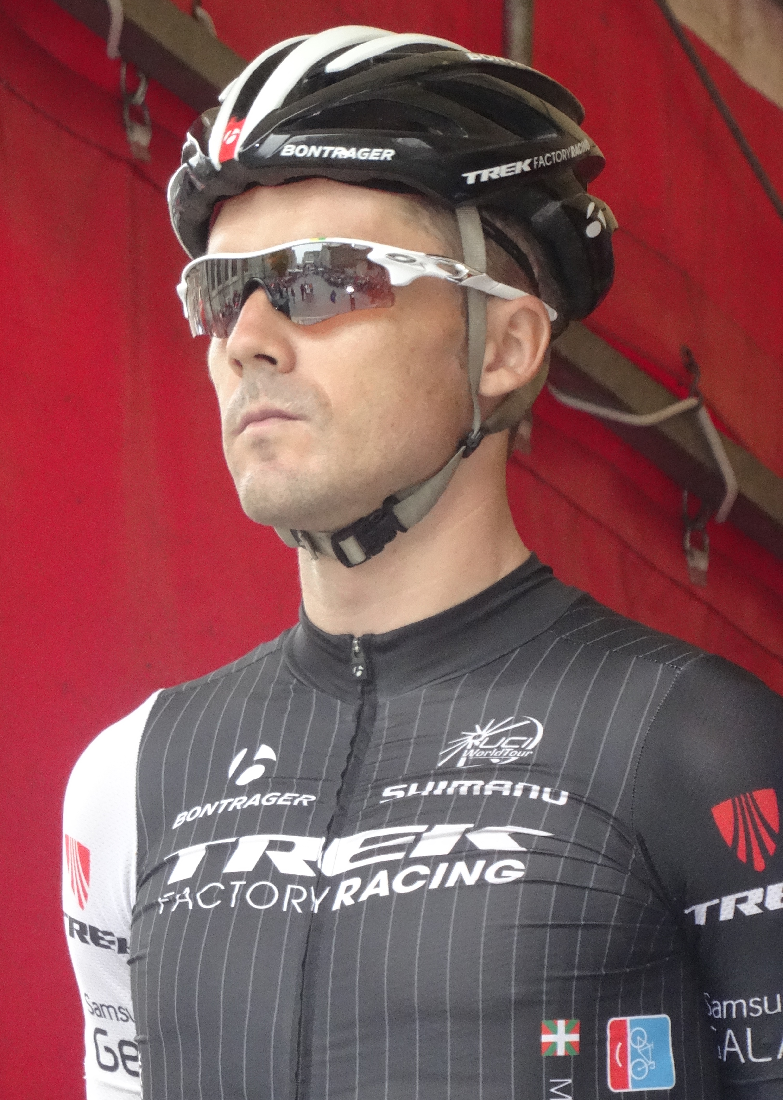 Reportage photographique réalisé le dimanche 14 septembre à l'occasion du départ et de l'arrivée du Grand Prix Jef Scherens 2014 à Louvain, Belgique.